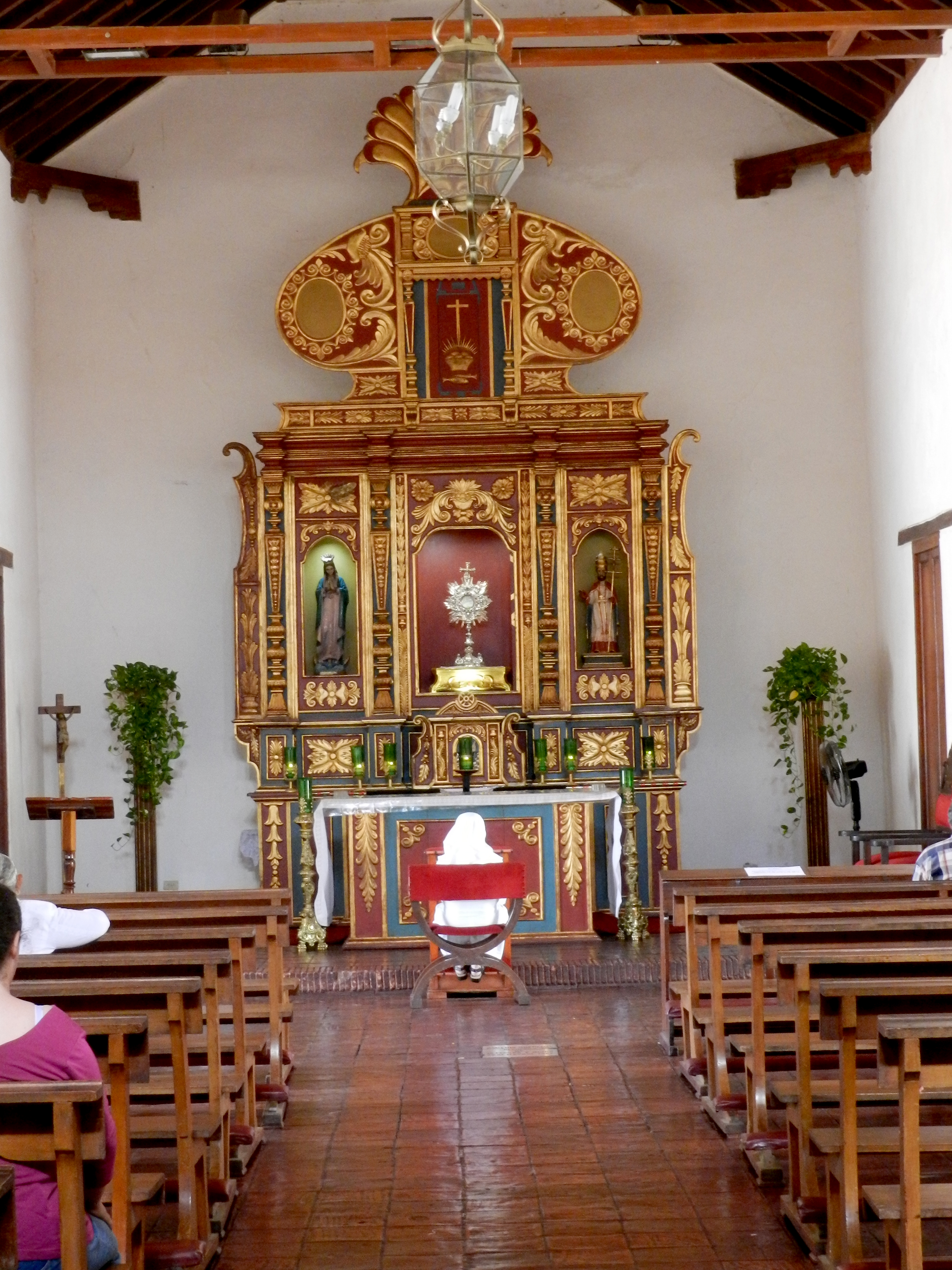 Santa Ana de Coro, Estado Falcón